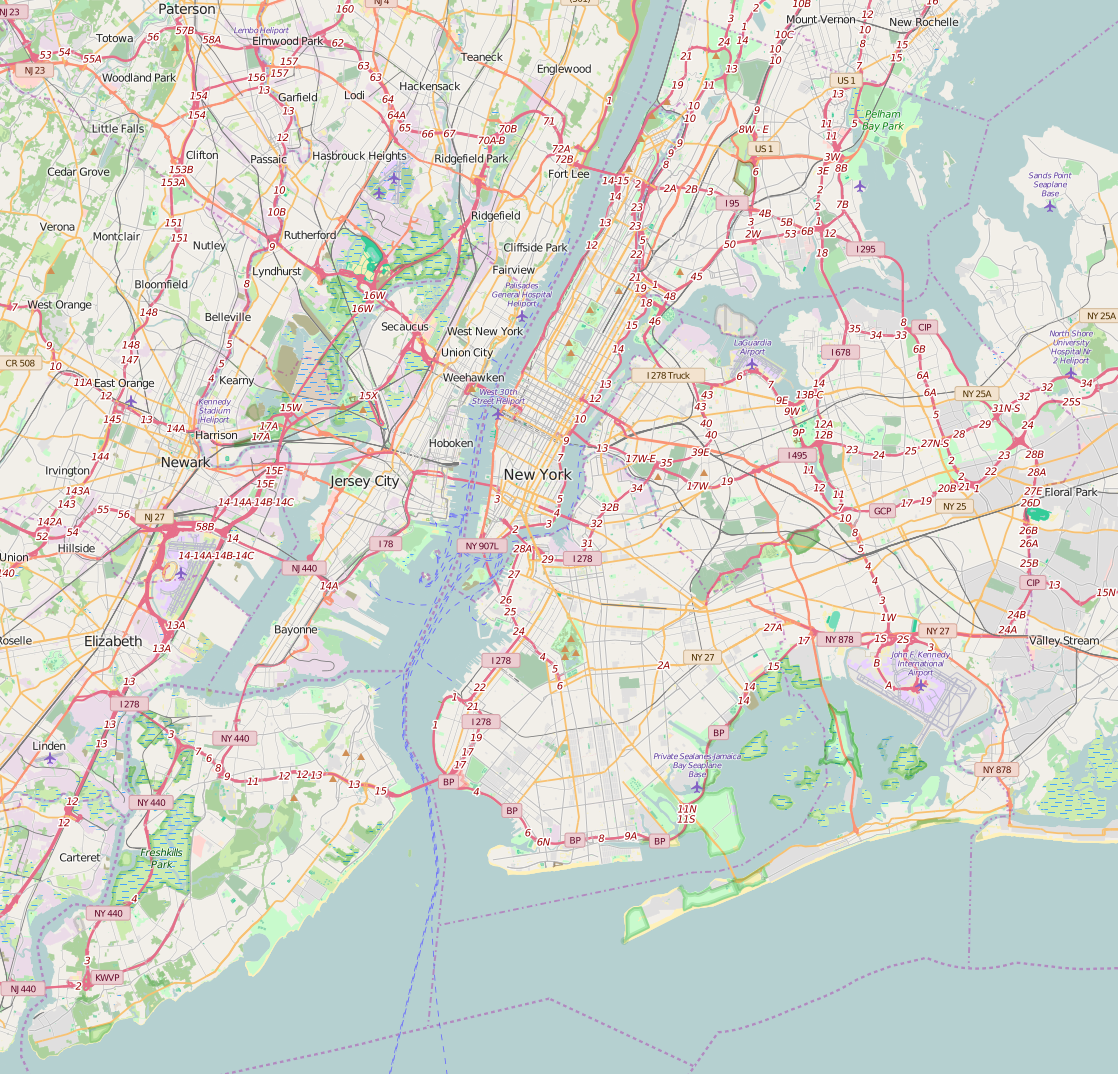 Mappa di New York Limiti geografici della mappa: N: 40.92° S: 40.49° W: 74.27° E: 73.68°